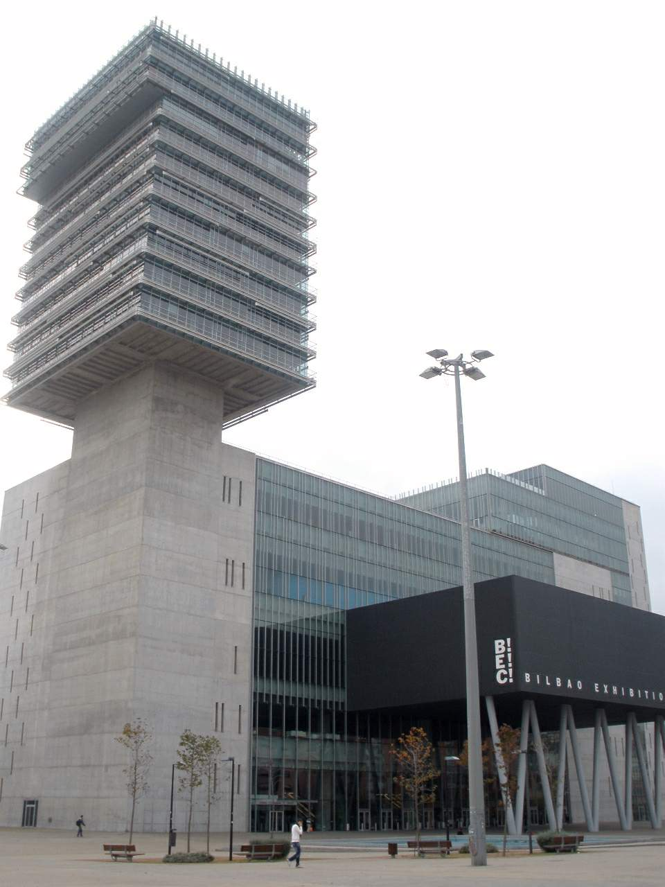 Bilbao Exhibition Centre (BEC), en Barakaldo (Bizkaia)